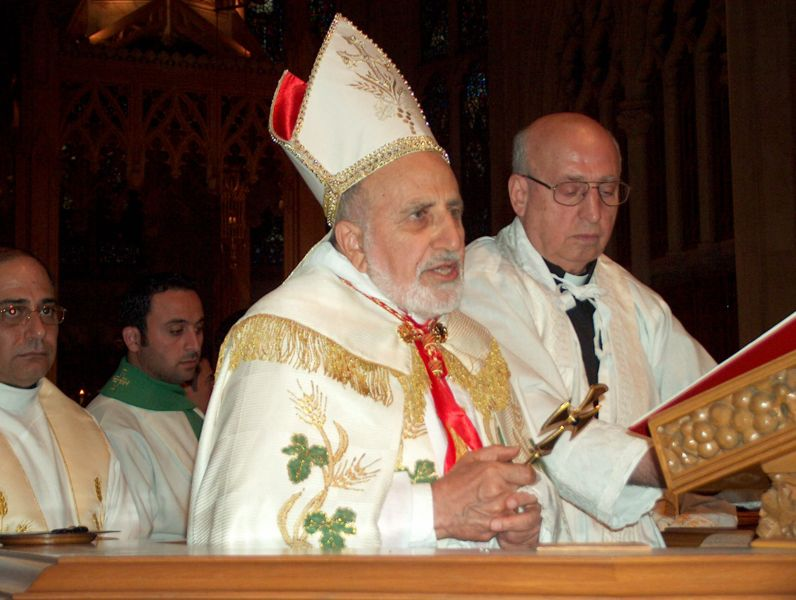 Emmanuel III Cardinal Delly